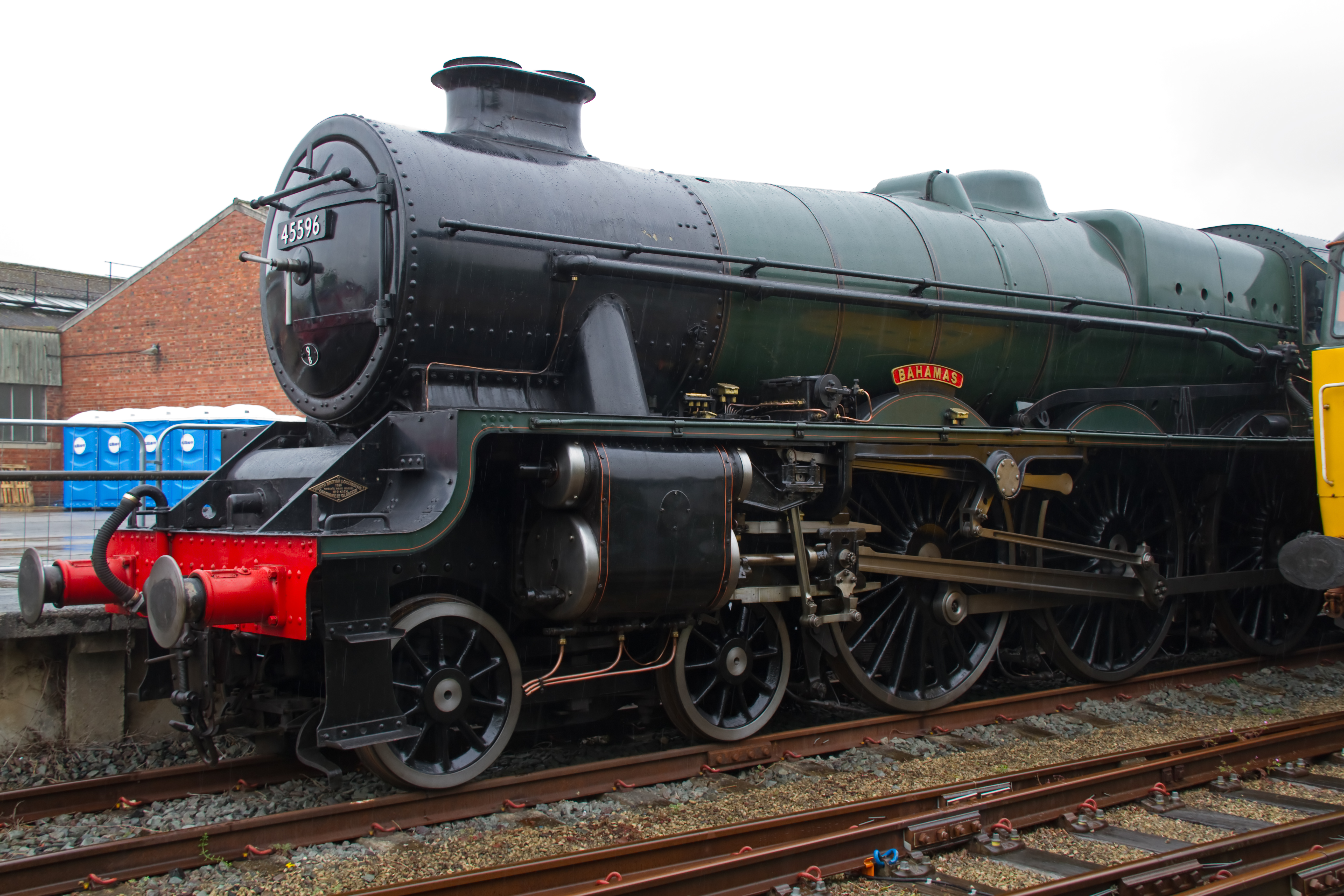 Bahamas 2